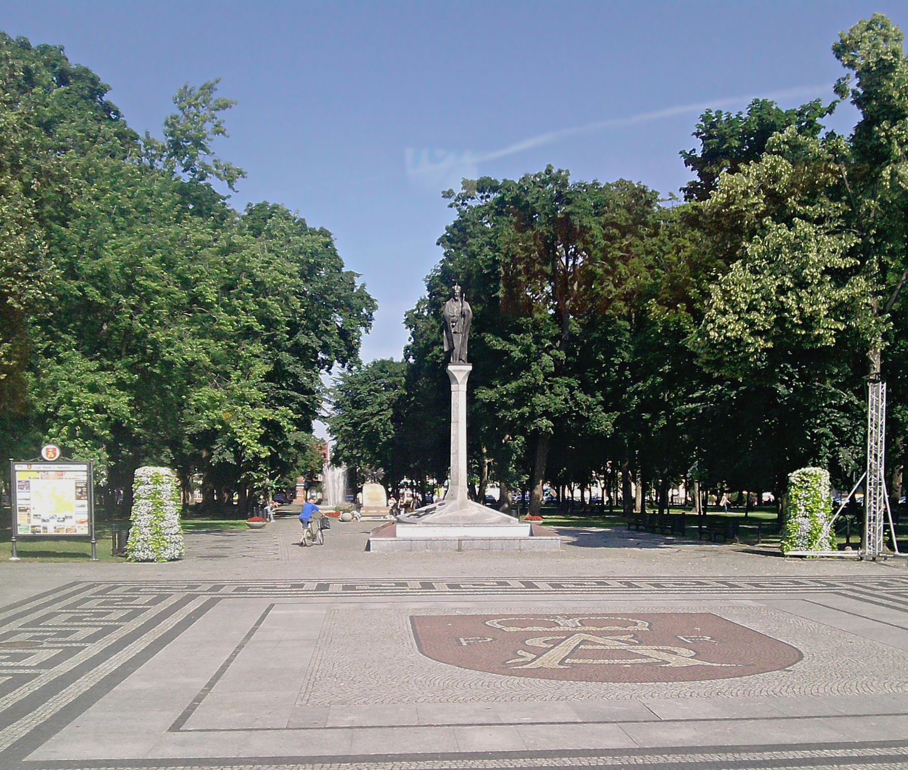 Парк в Августове.